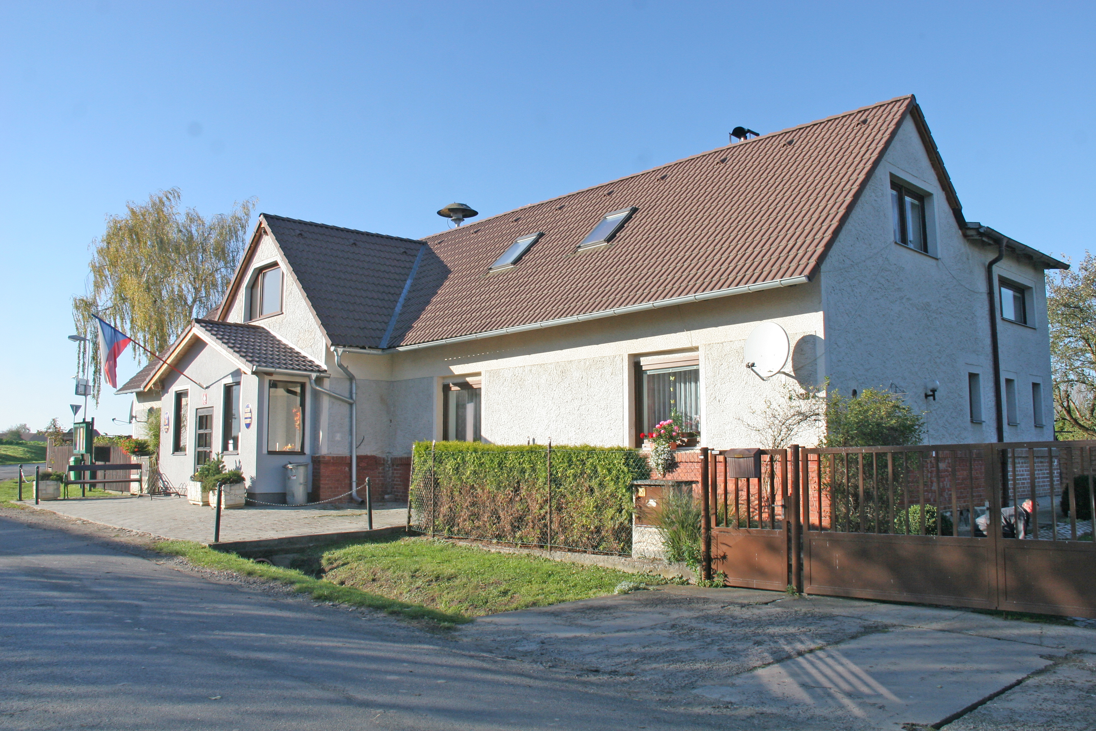 Výčapy obecní úřad